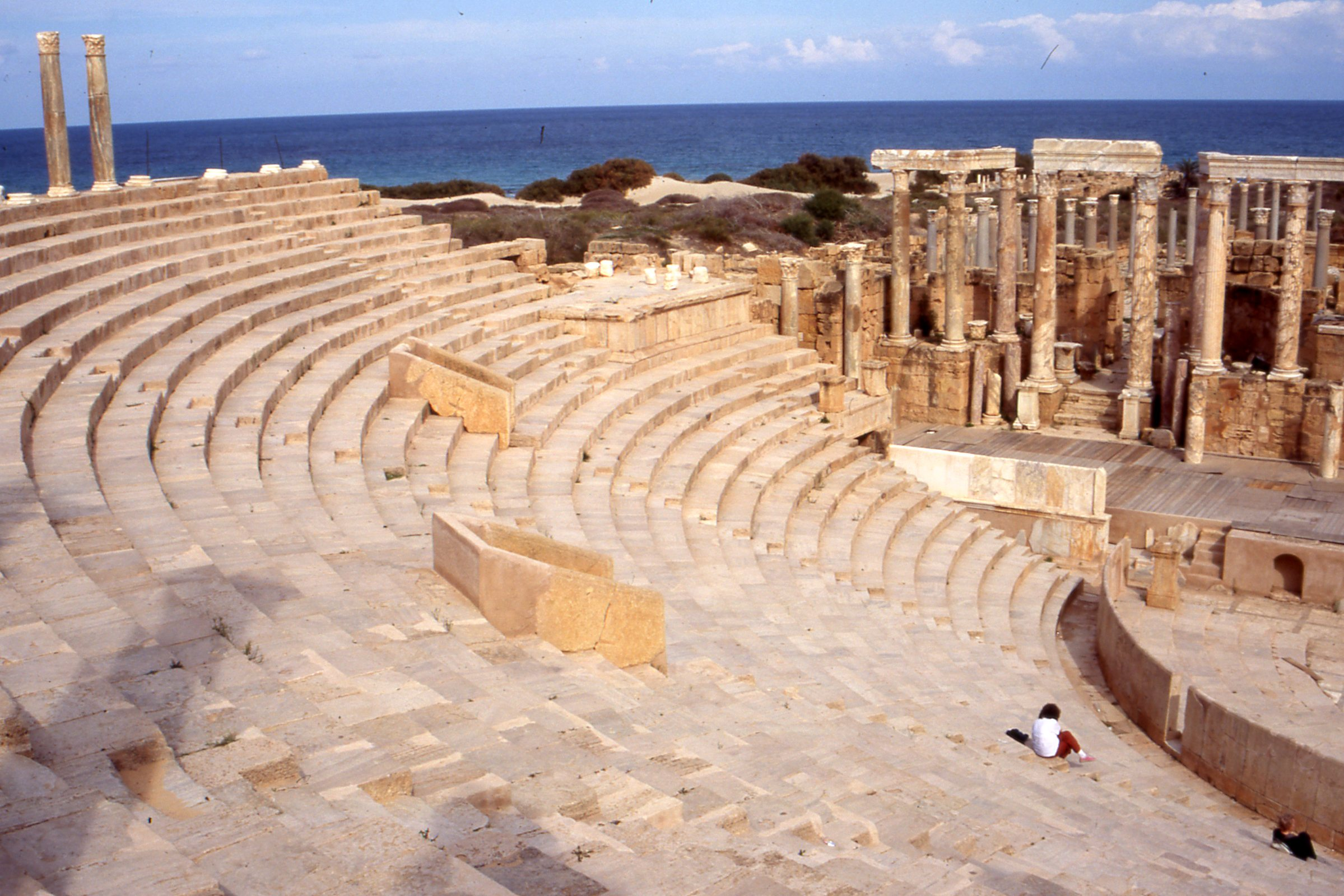 Leptis Magna - Labdah, Libya November 2004